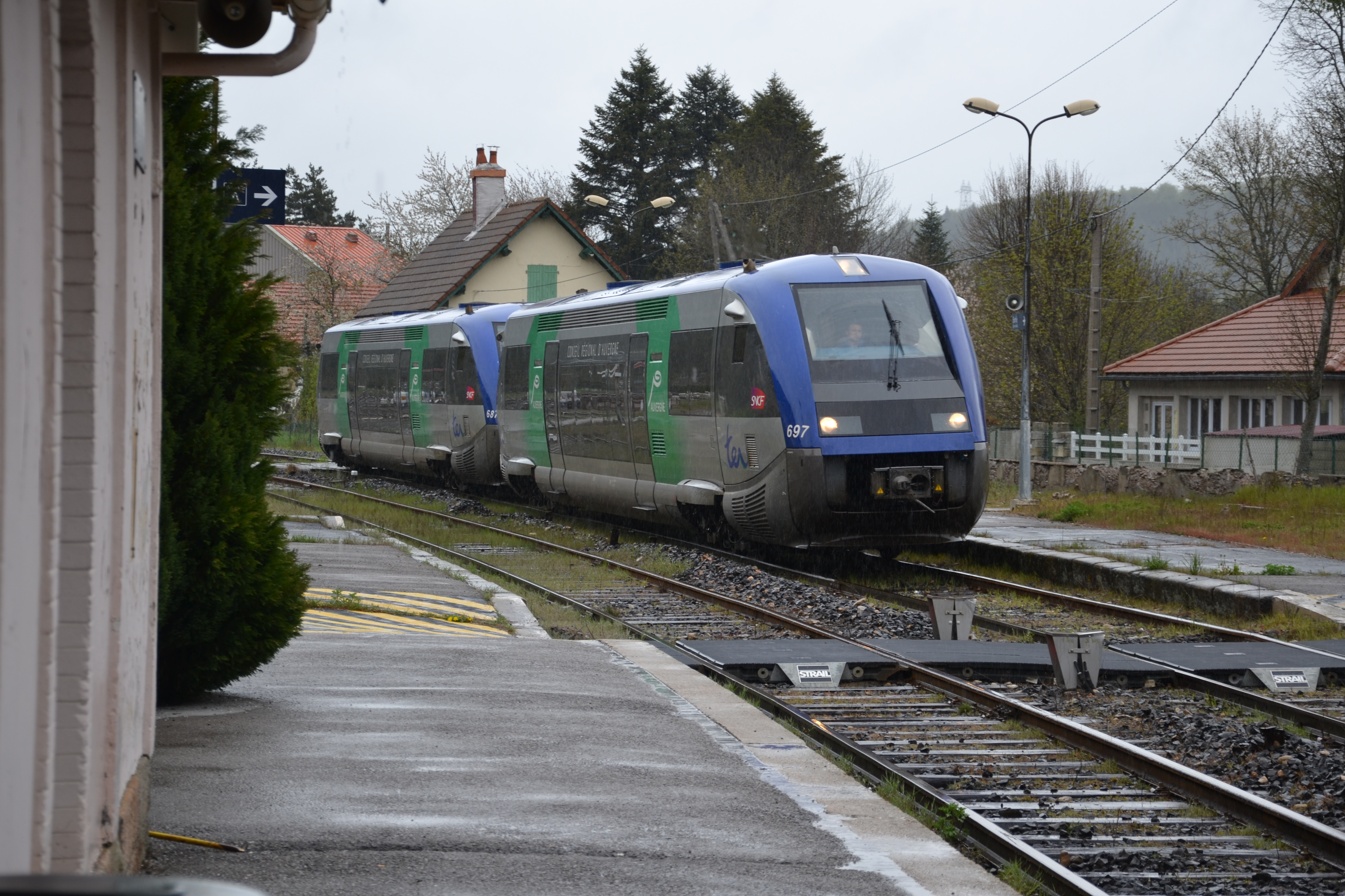 Le train intercités Cévenol n° 15957 s’apprête à marquer l'arrêt en gare de la Bastide St Laurent les bains à 16h03 en livré TER Auvergne